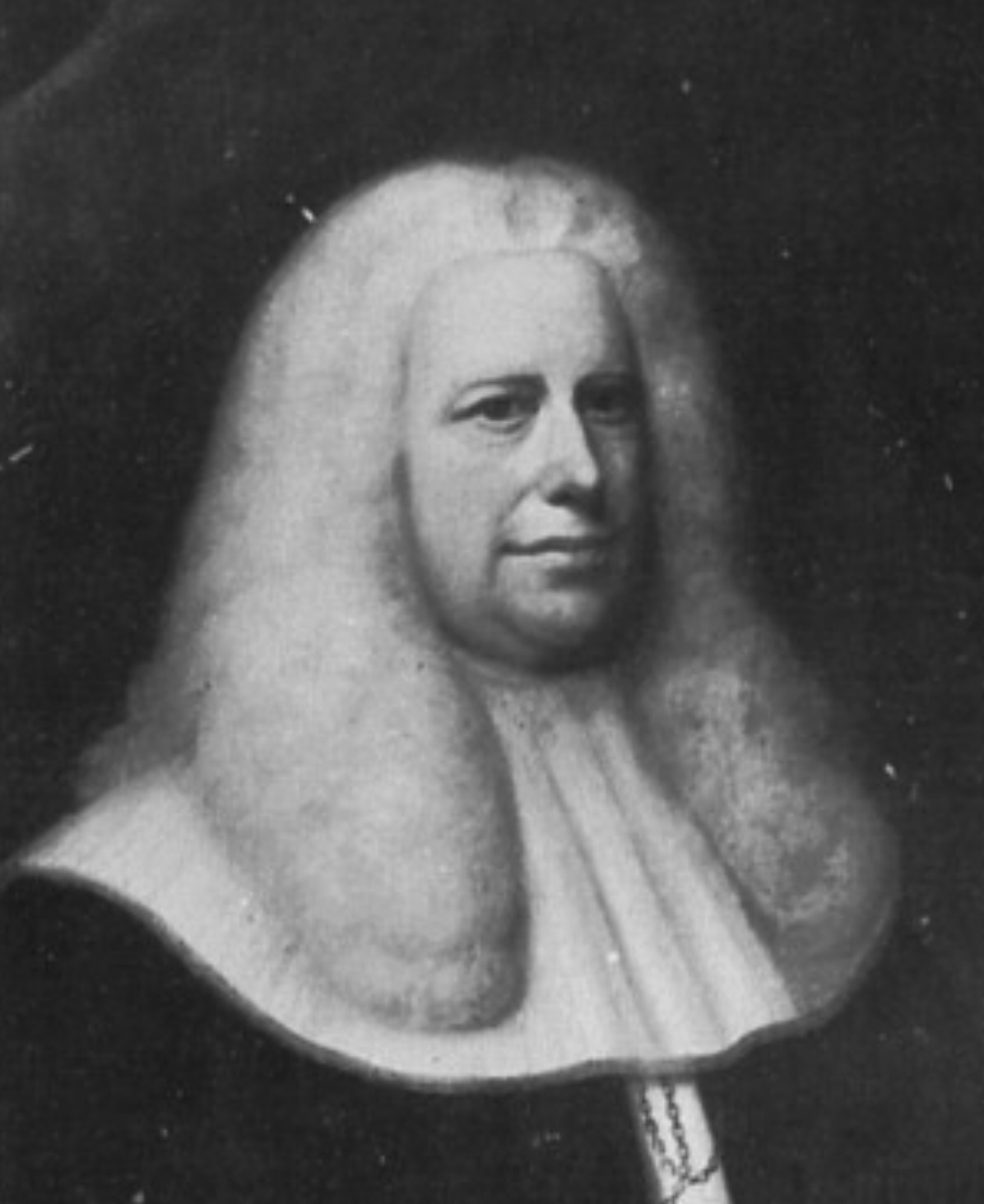 Hermann Münter (* 1679; † 7. Januar 1743), Lübecker Ratsherr